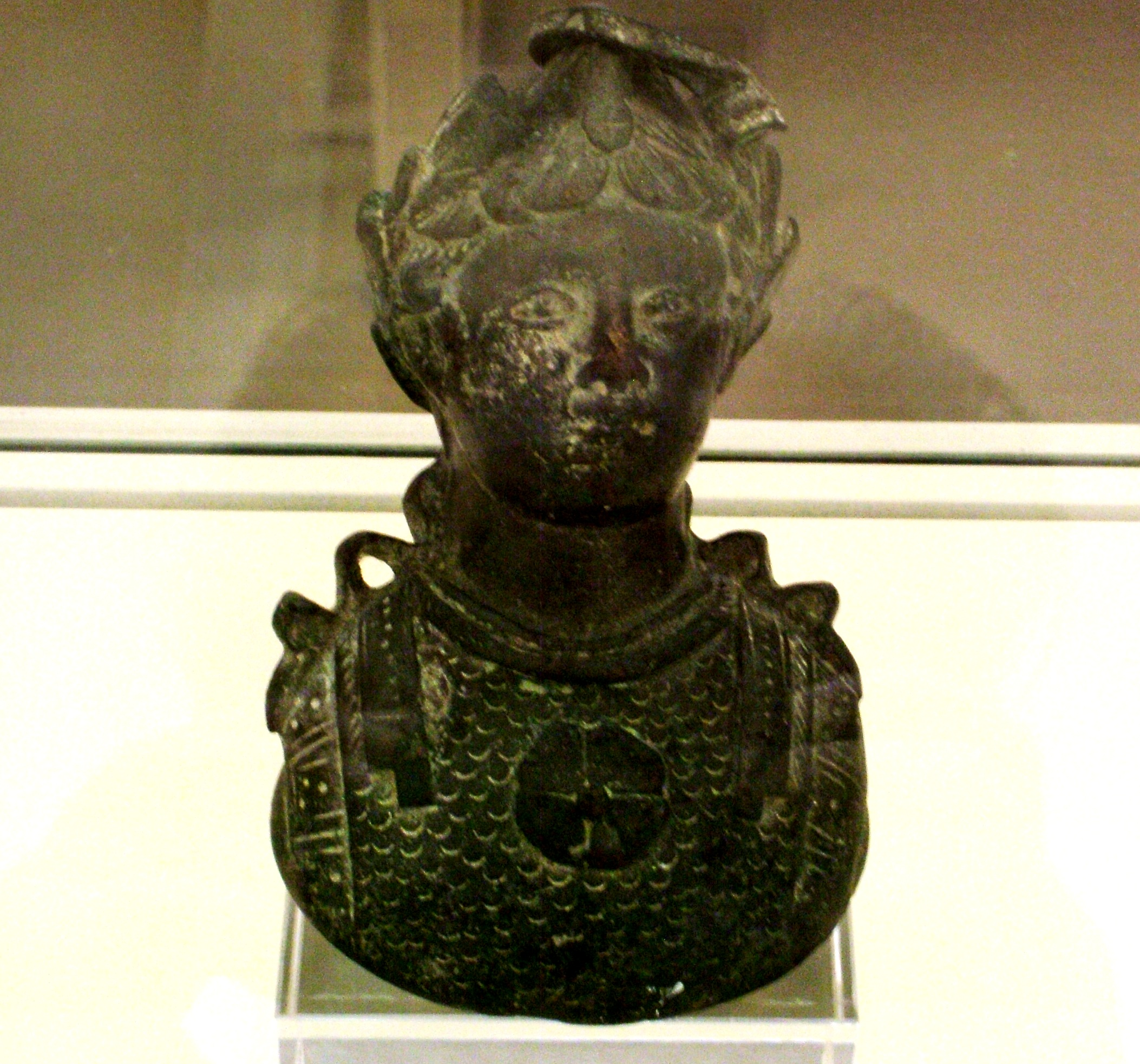 Etruszk bronzszobor (Etruszk Nemzeti Múzeum, Róma)